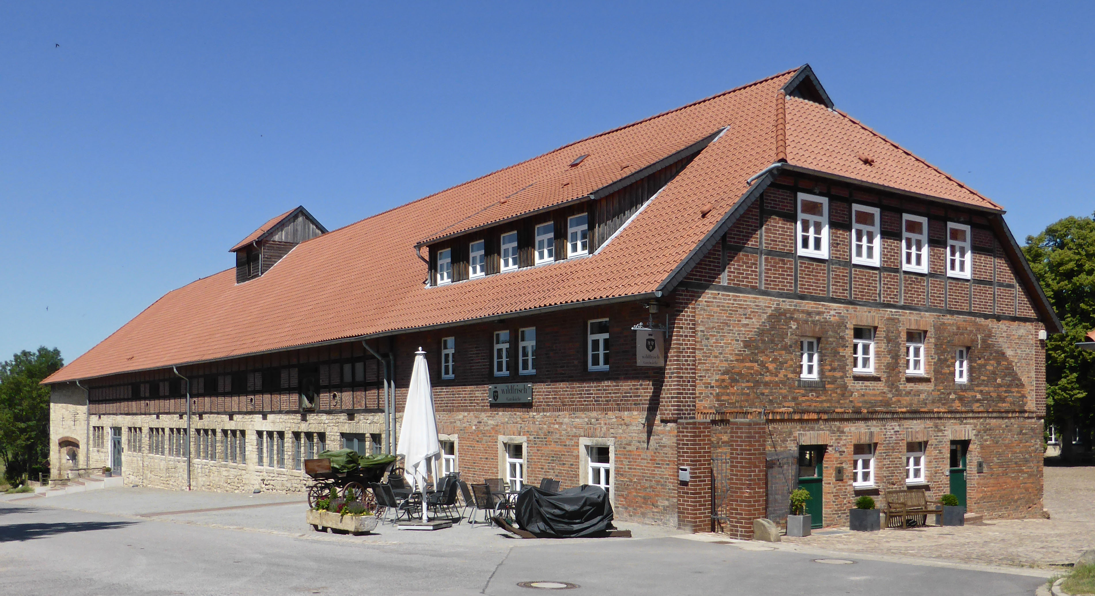 Restaurant "Gutsküche Wildfrisch" auf dem Rittergut Nordsteimke.